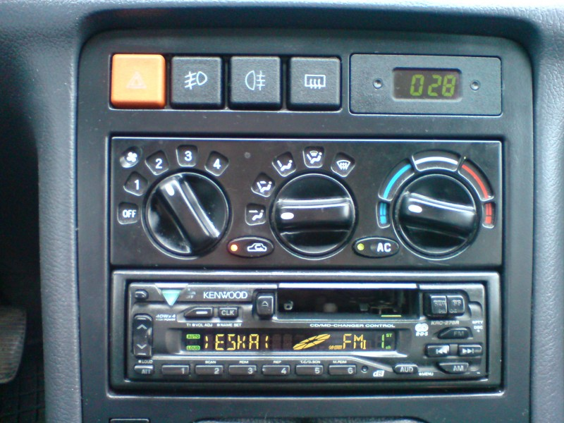 Klimatyzacja Polonez Caro Plus